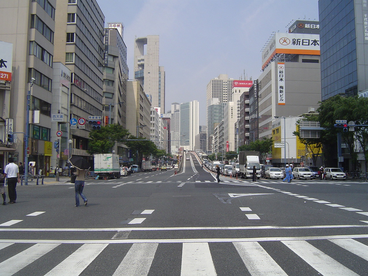 西天満交差点から眺める南森町ランプ